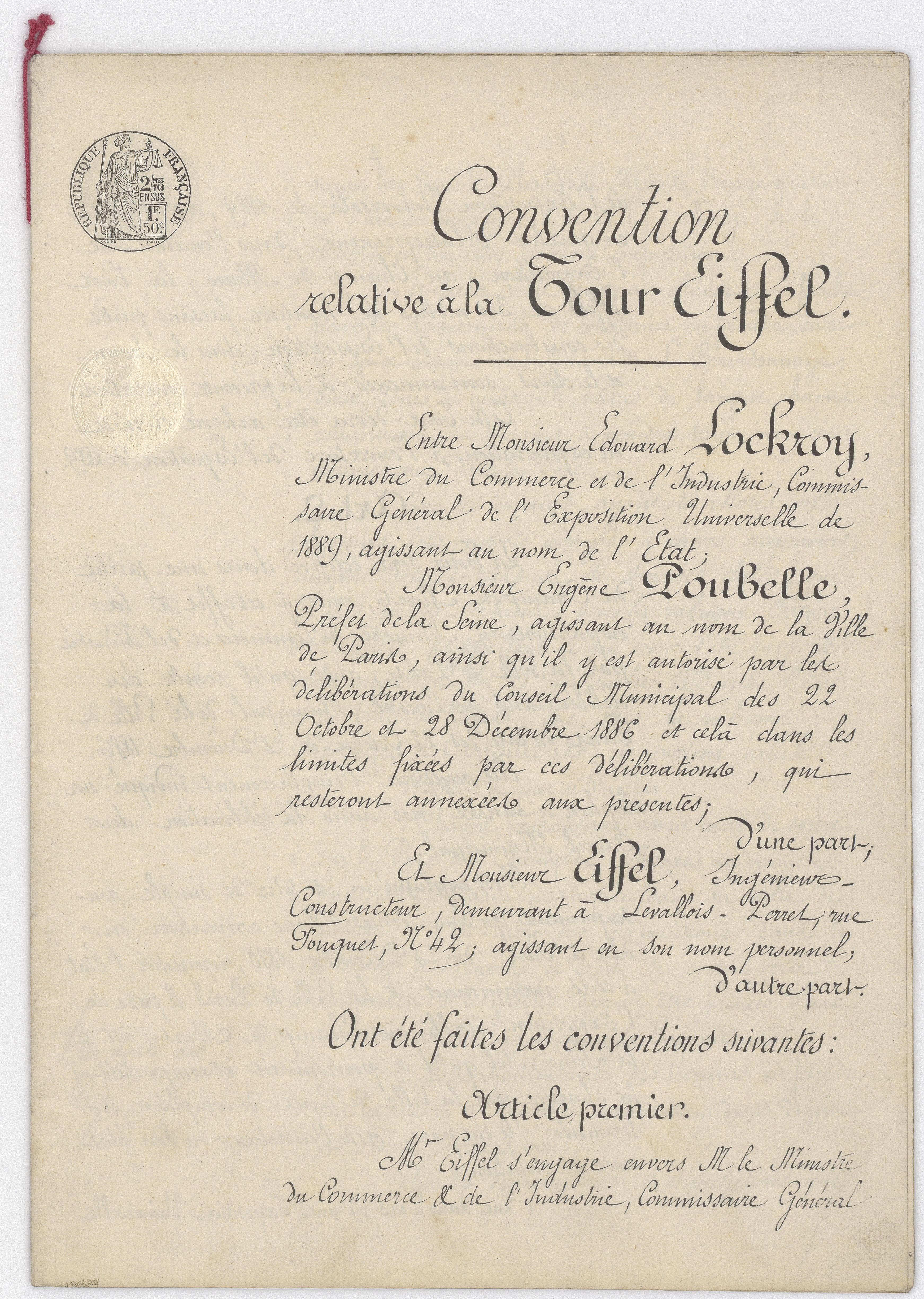 Convention conclue le 8 janvier 1887 entre l'État, représenté par le ministre du commerce et de l’industrie Édouard Lockroy, la ville de Paris, représentée par le préfet de la Seine Eugène Poubelle, et Gustave Eiffel, relative à l’emplacement et aux modalités de construction et d’exploitation de la "Tour de 300 mètres" (première page).